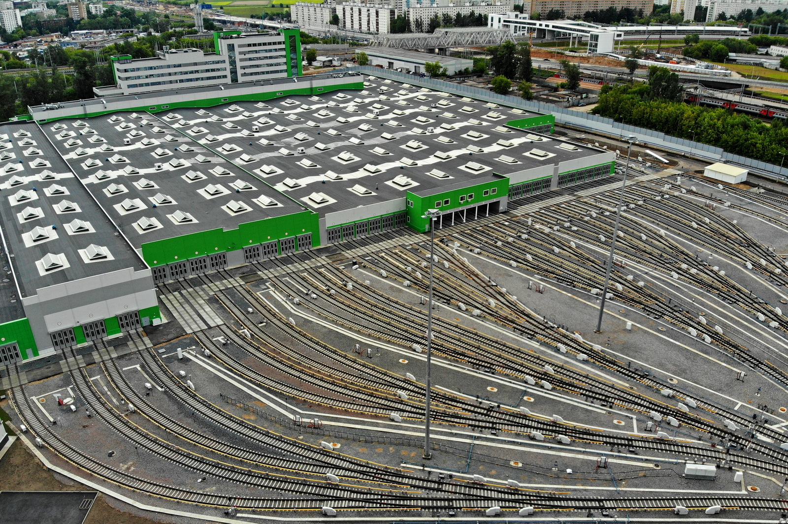 Вид на здание депо и парковые пути